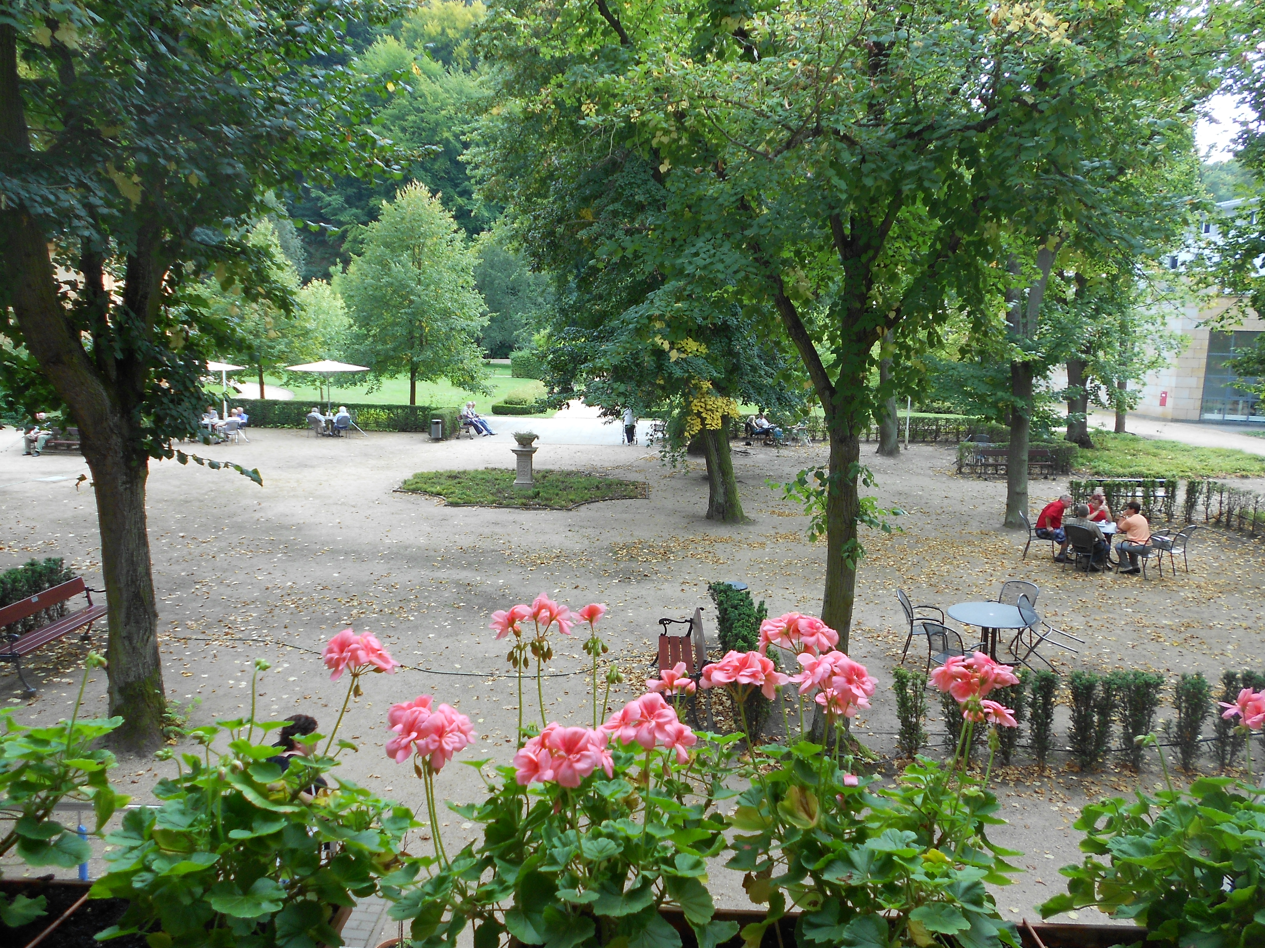 Fachklinik und Moorbad Bad Freienwalde